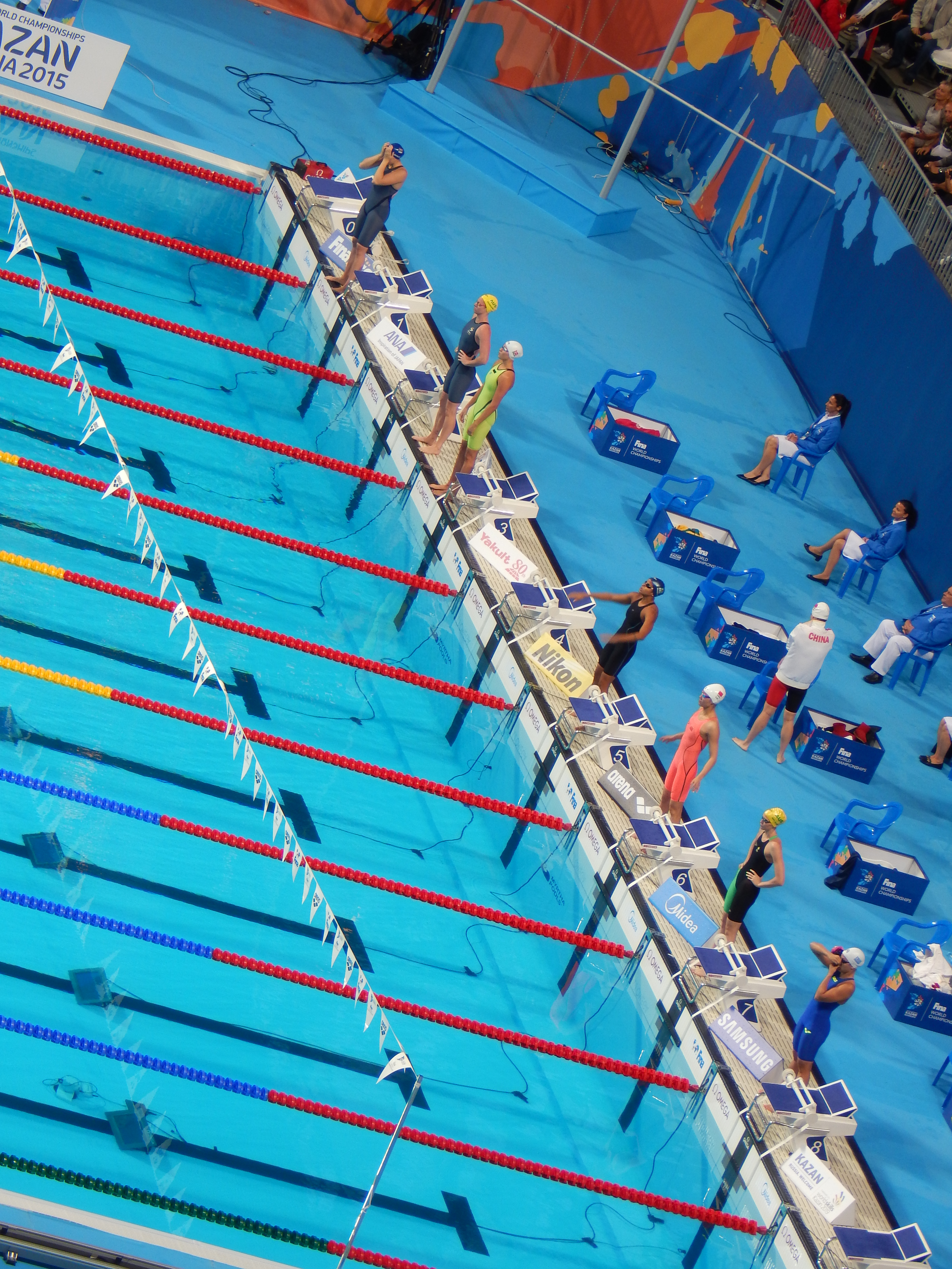 Финальный заплыв у женщин на дистанции 50 метров на спине в Казани на чемпионате мира 2015